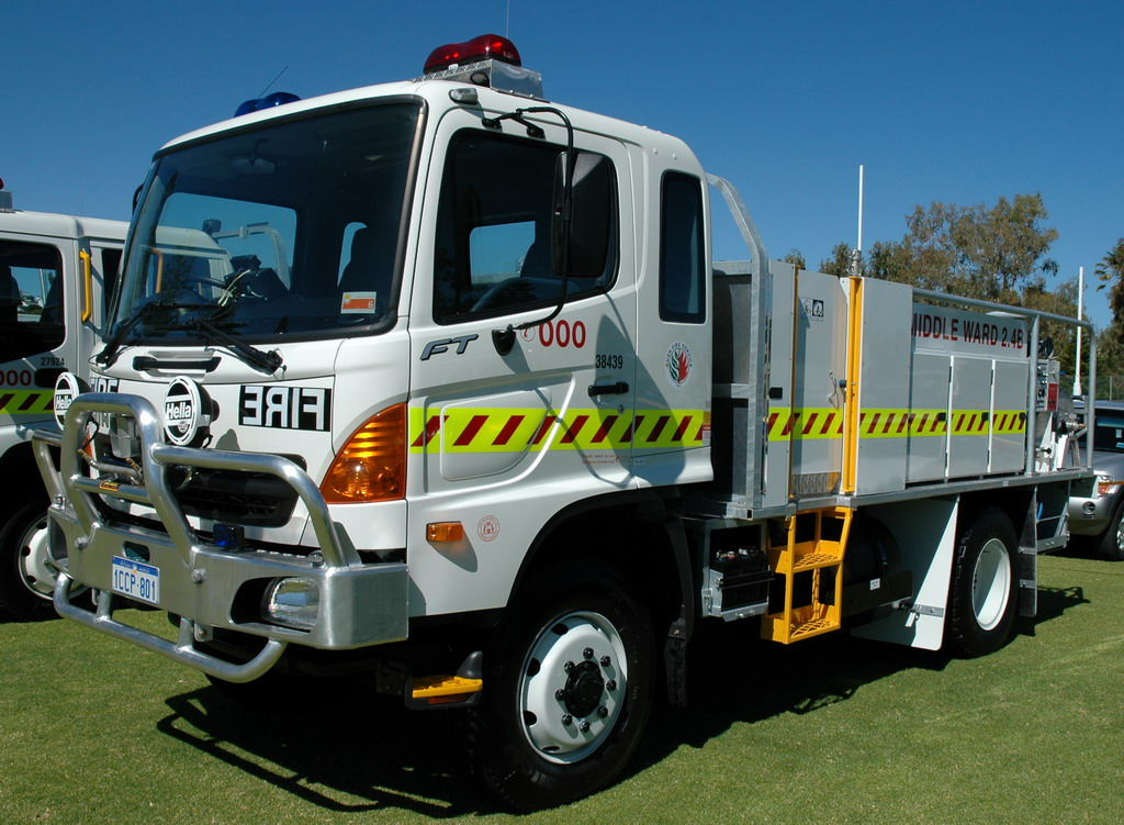 FESA Hino 2.4 rural tanker - Middle Ward.